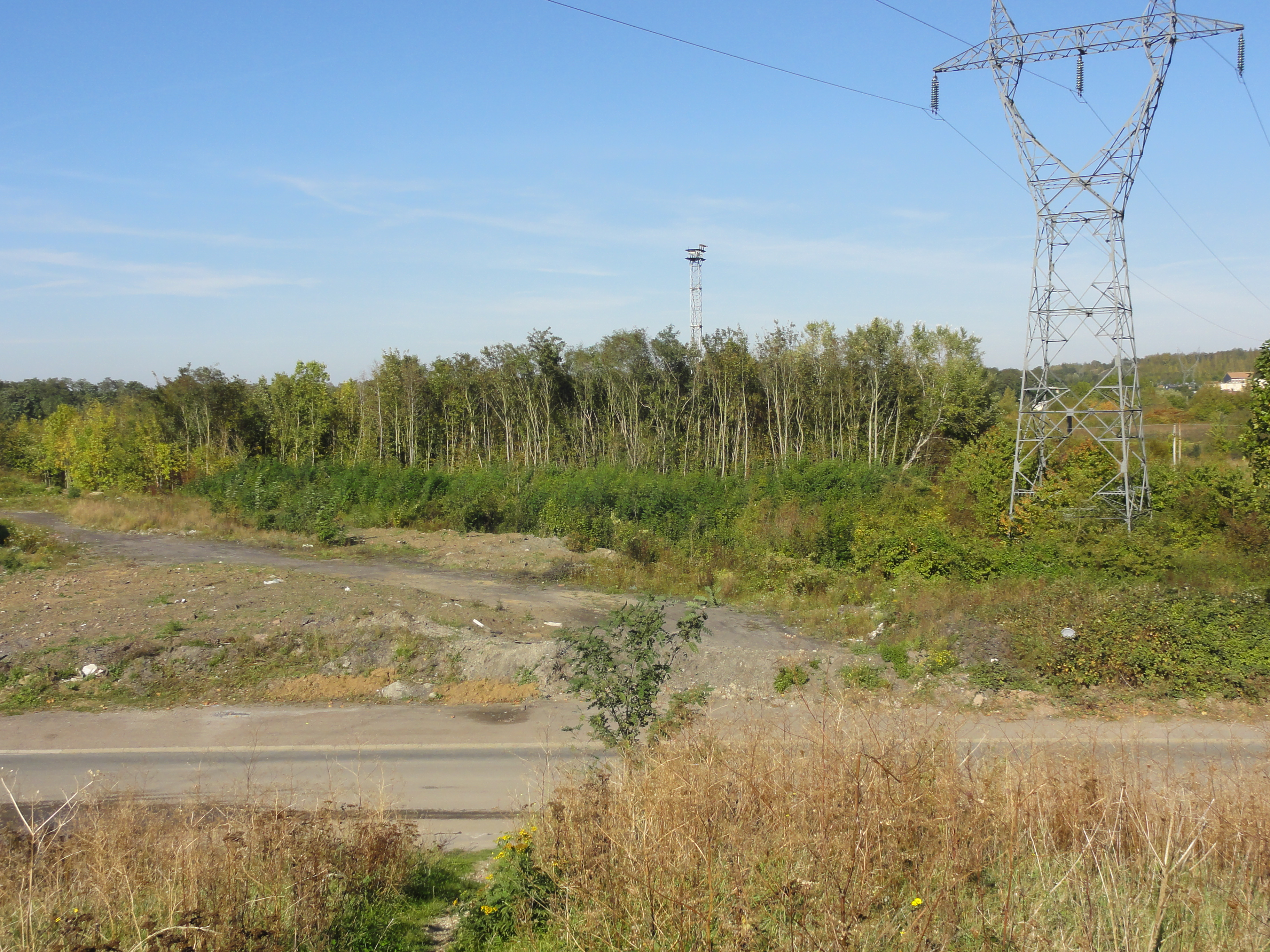 Terril n° 239 dit Cavalier du 10, fosse n° 10 - 20 de la Compagnie des mines de Courrières dans le bassin minier du Nord-Pas-de-Calais, Billy-Montigny, Pas-de-Calais, Nord-Pas-de-Calais, France.